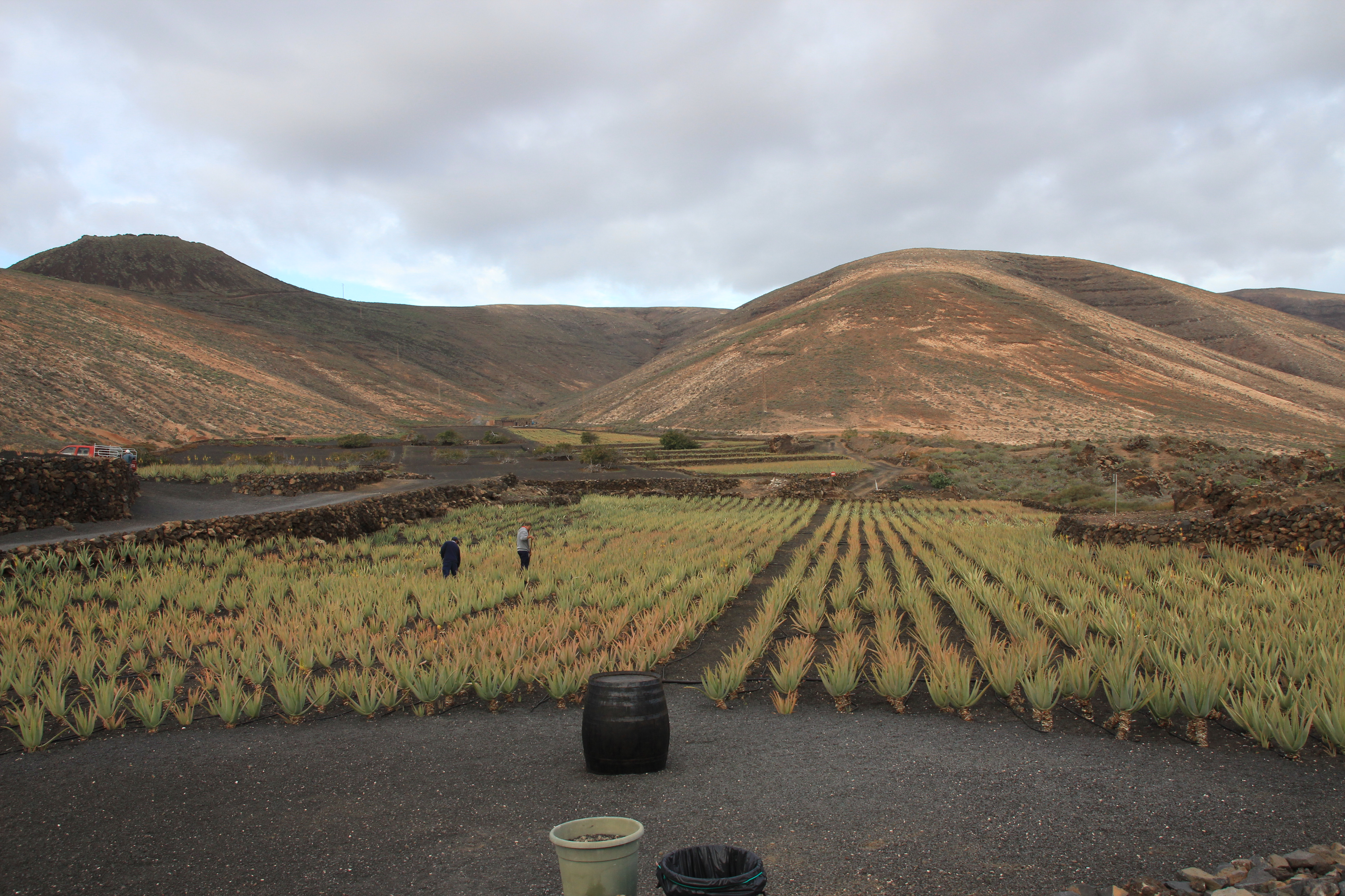 Panorámica de la Finca Ecológica de Lanzaloe